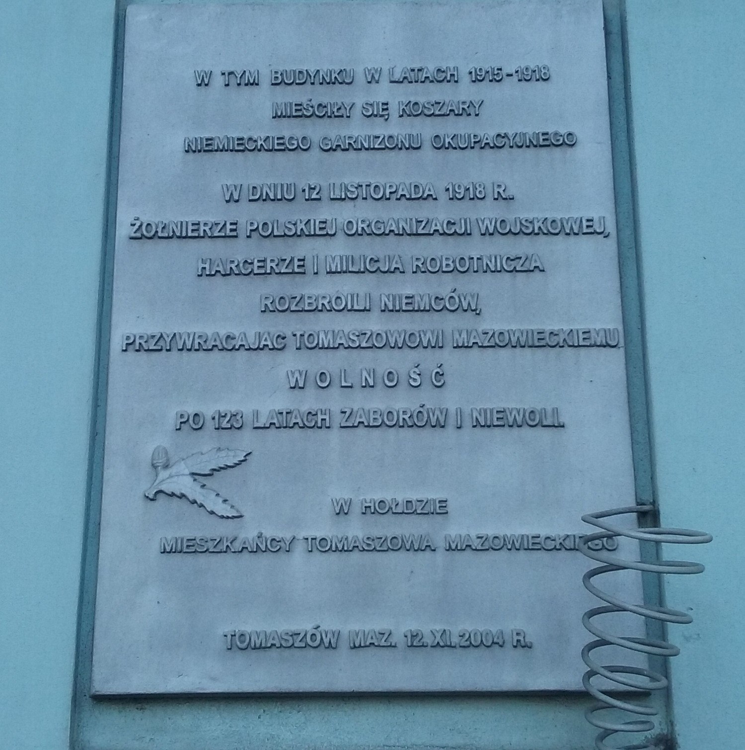 Tablica pamiątkowa na Poczcie Głównej w Tomaszowie Mazowieckim upamiętniajaca znajdujące się tu poczas I wojny światowej koszary niemieckie